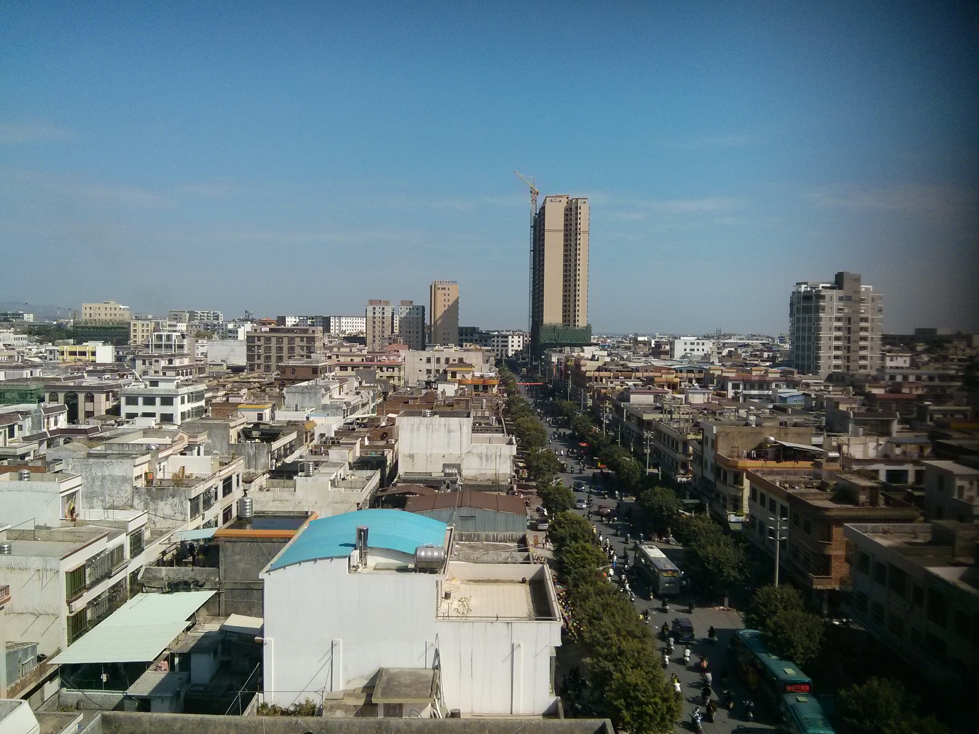 碣石镇锦江大道